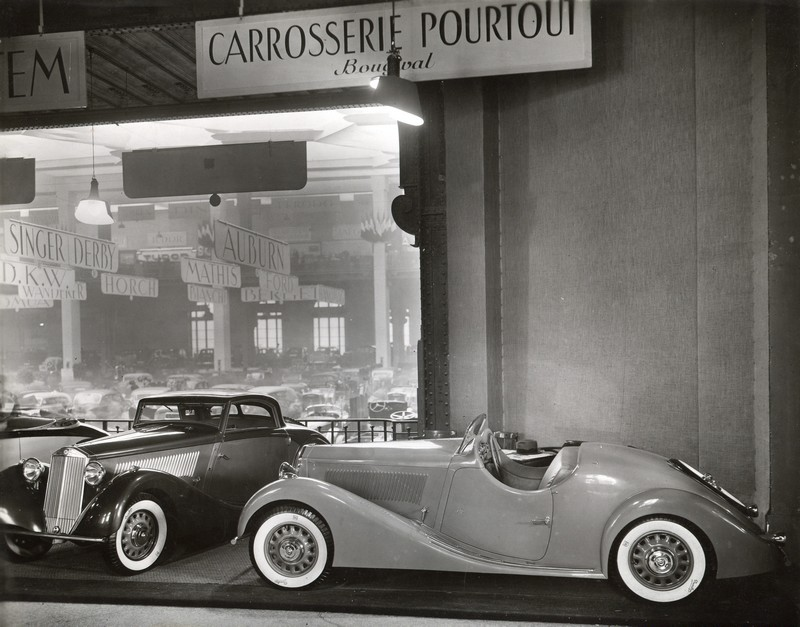 Lancia Belna Eclipse et Roadster Pourtout - Salon 1935